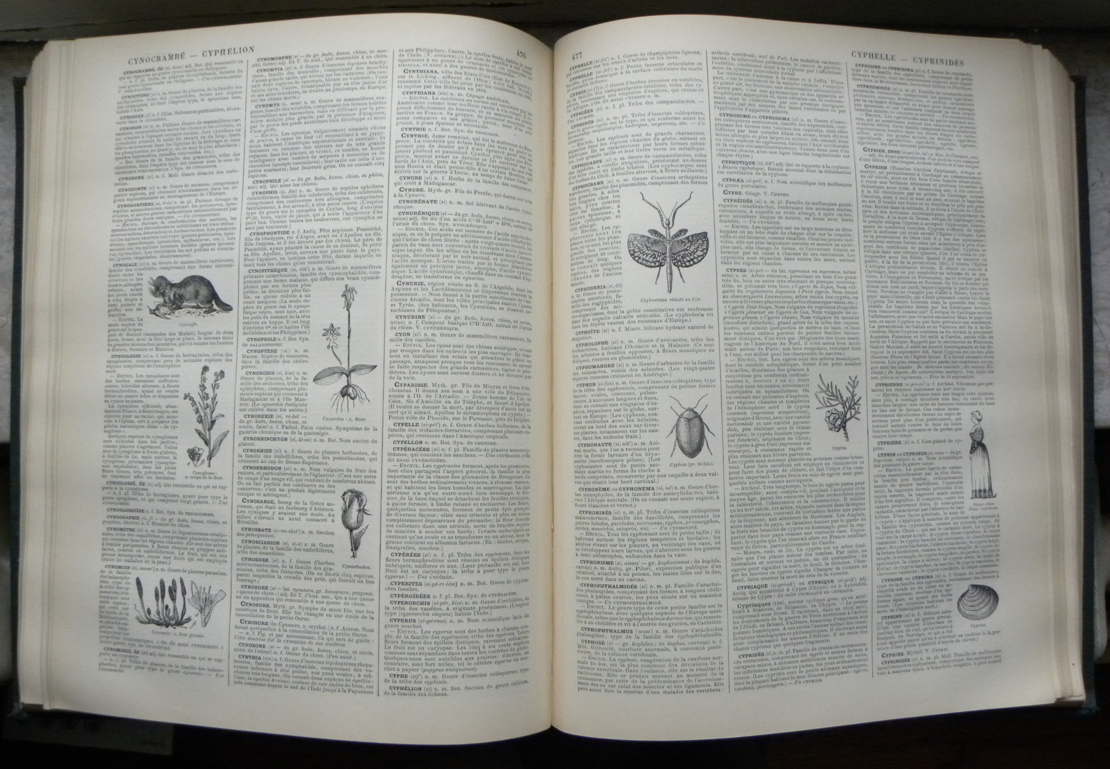 Le Nouveau Dictionnaire Larousse Volume 2 pages 476-477. Aperçu de la mise en page des articles et illustrations dans un volume.